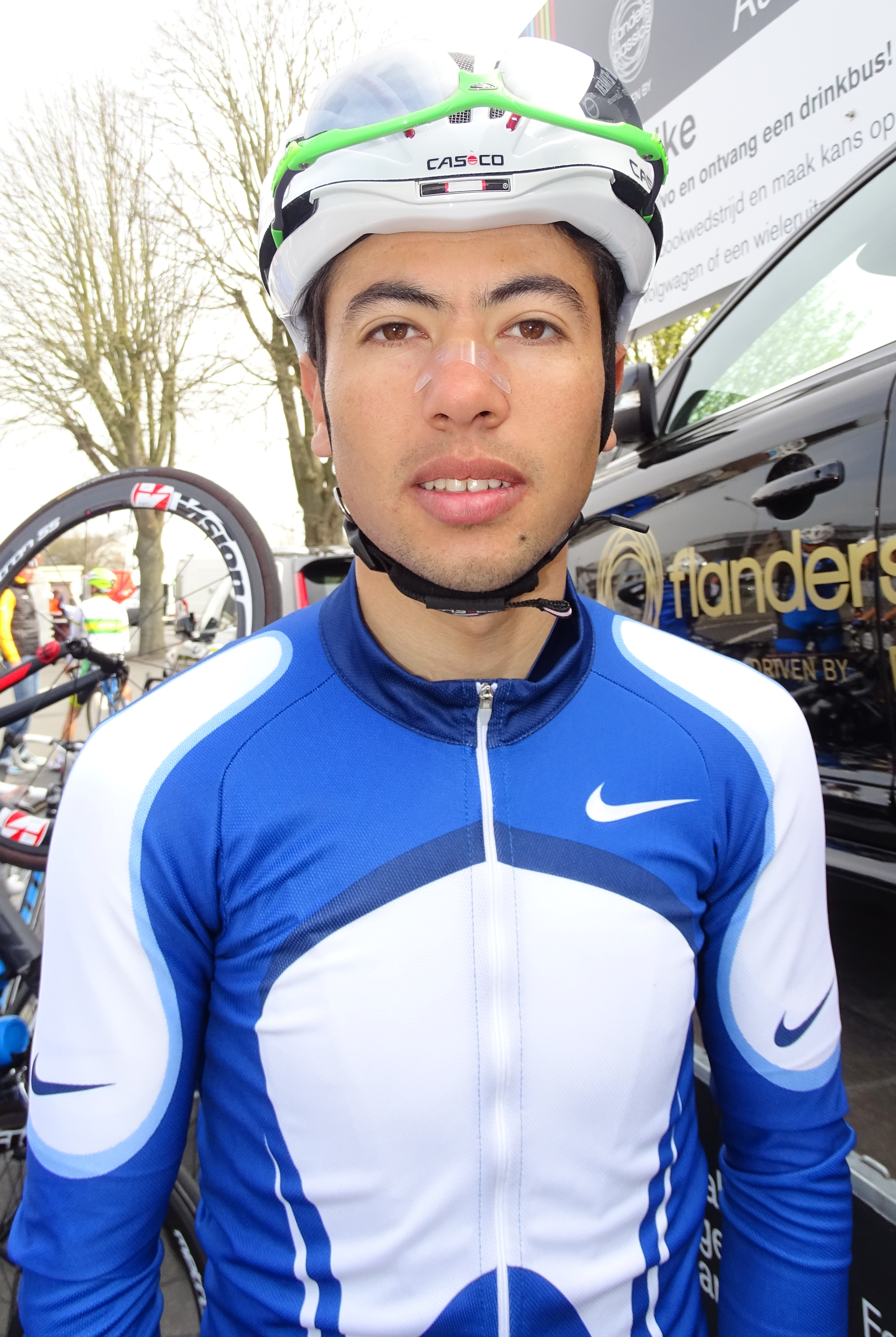 Reportage réalisé le samedi 9 avril à l'occasion du départ et de l'arrivée du Tour des Flandres espoirs 2016 à Audenarde, Belgique.